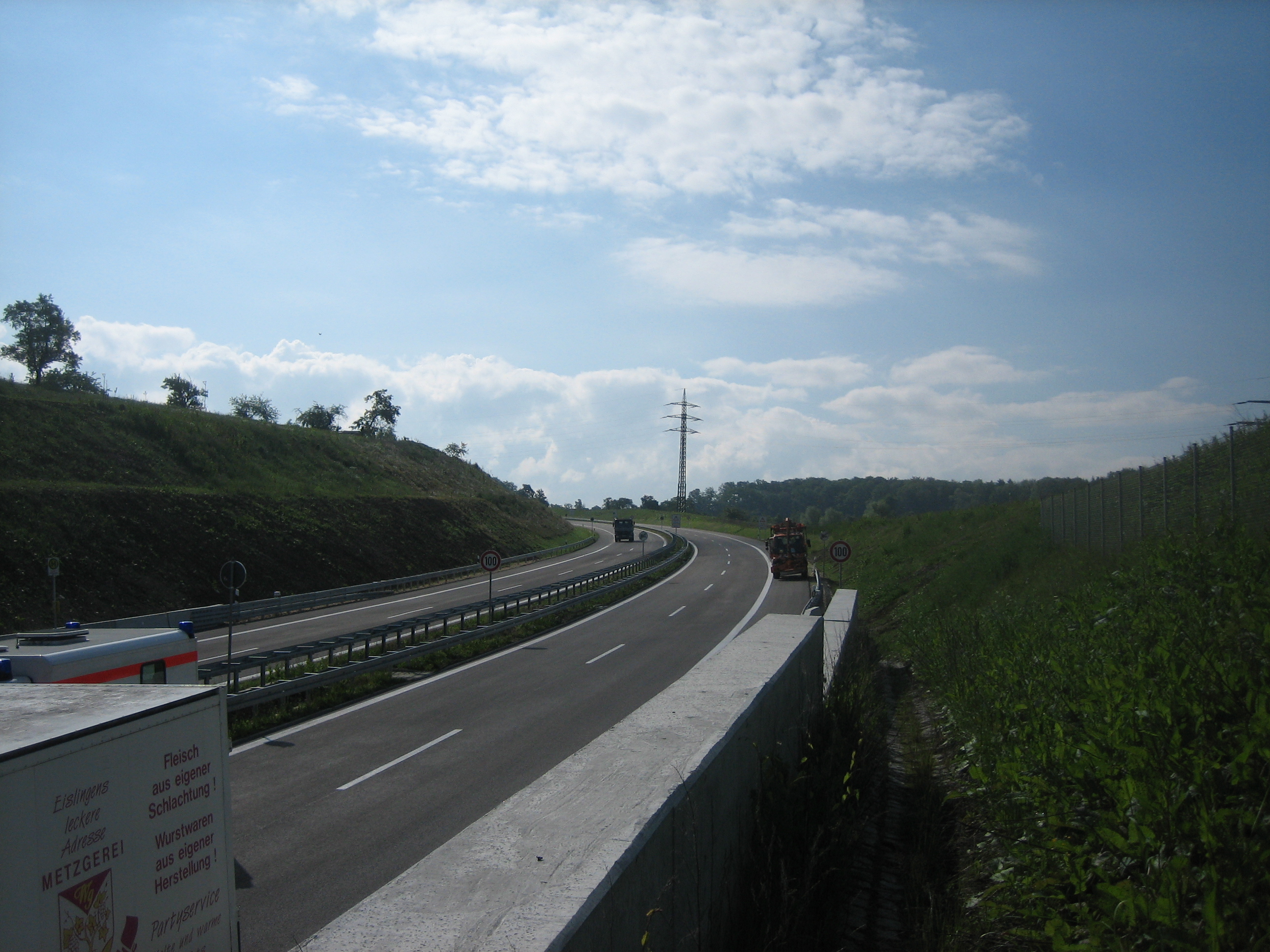 B10 Teilstrecke bei Eislingen